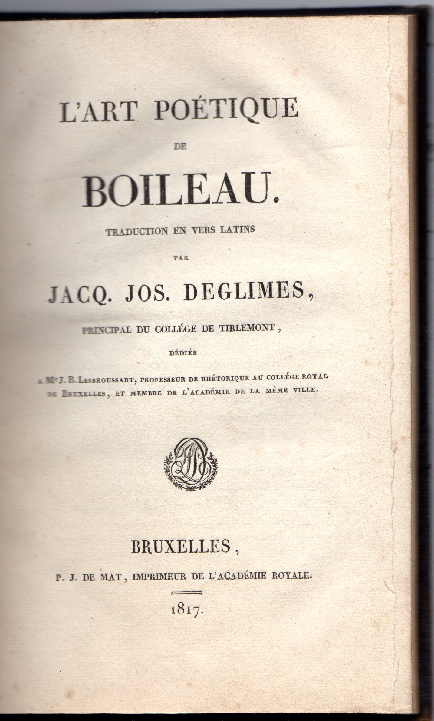 Page de titre du livre de Jacques Joseph Deglimes "l'Art poétique de Boileau", traduit en latin, Bruxelles, imprimerie P.J. De Mat, 1817.